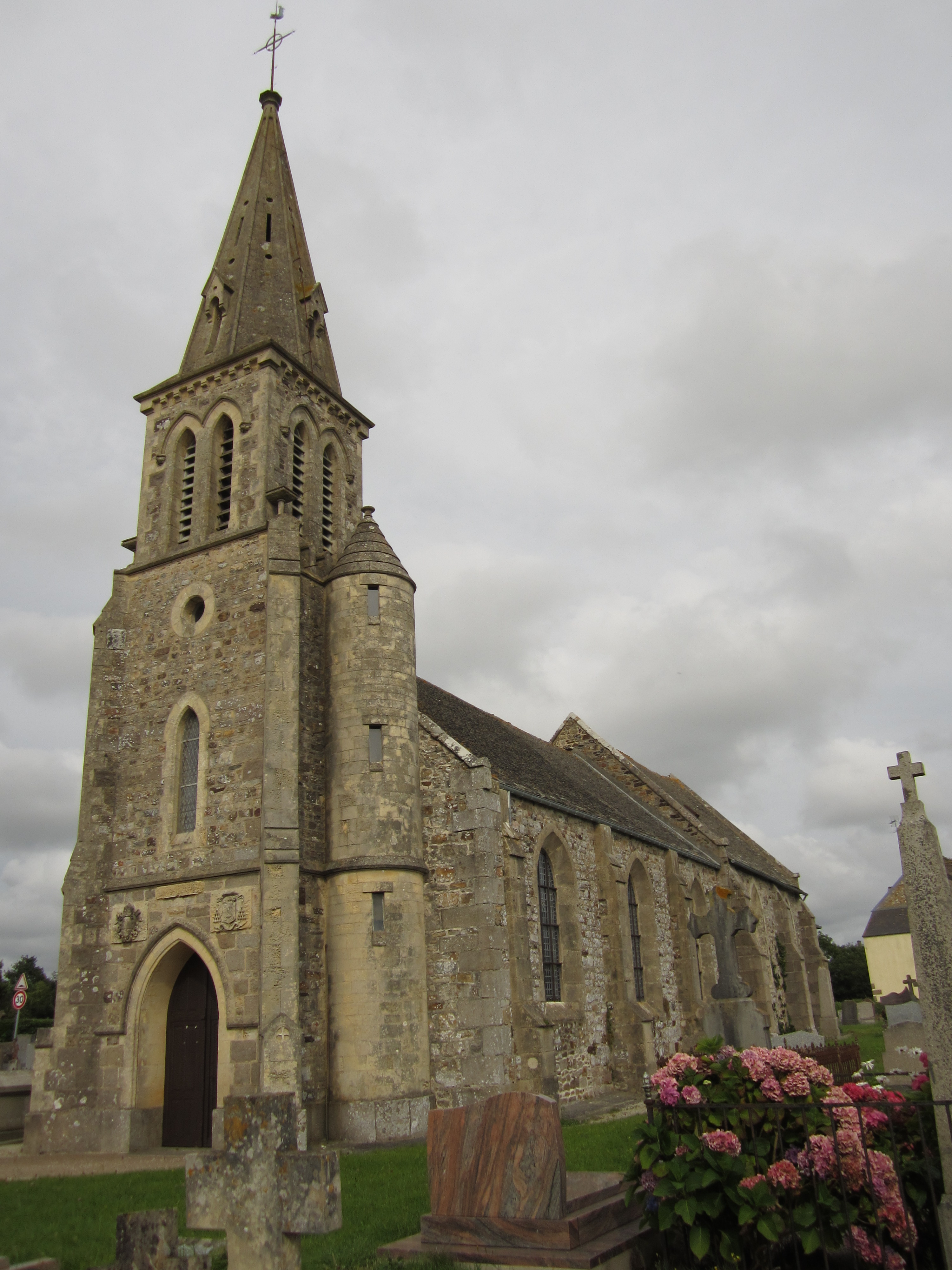 Église Saint-Pierre d'Helleville